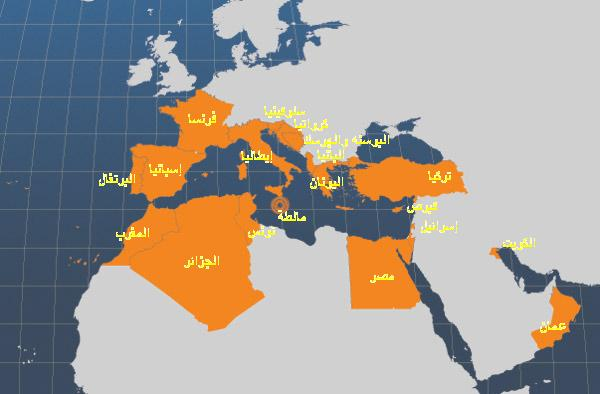 الدول الرئيسيه المنتجه لأسماك الدنيس